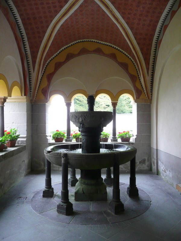 Prämonstratenser Abtei St. Maria und Johannes Evangelist, Bendorf (Germany); cloister, fountain